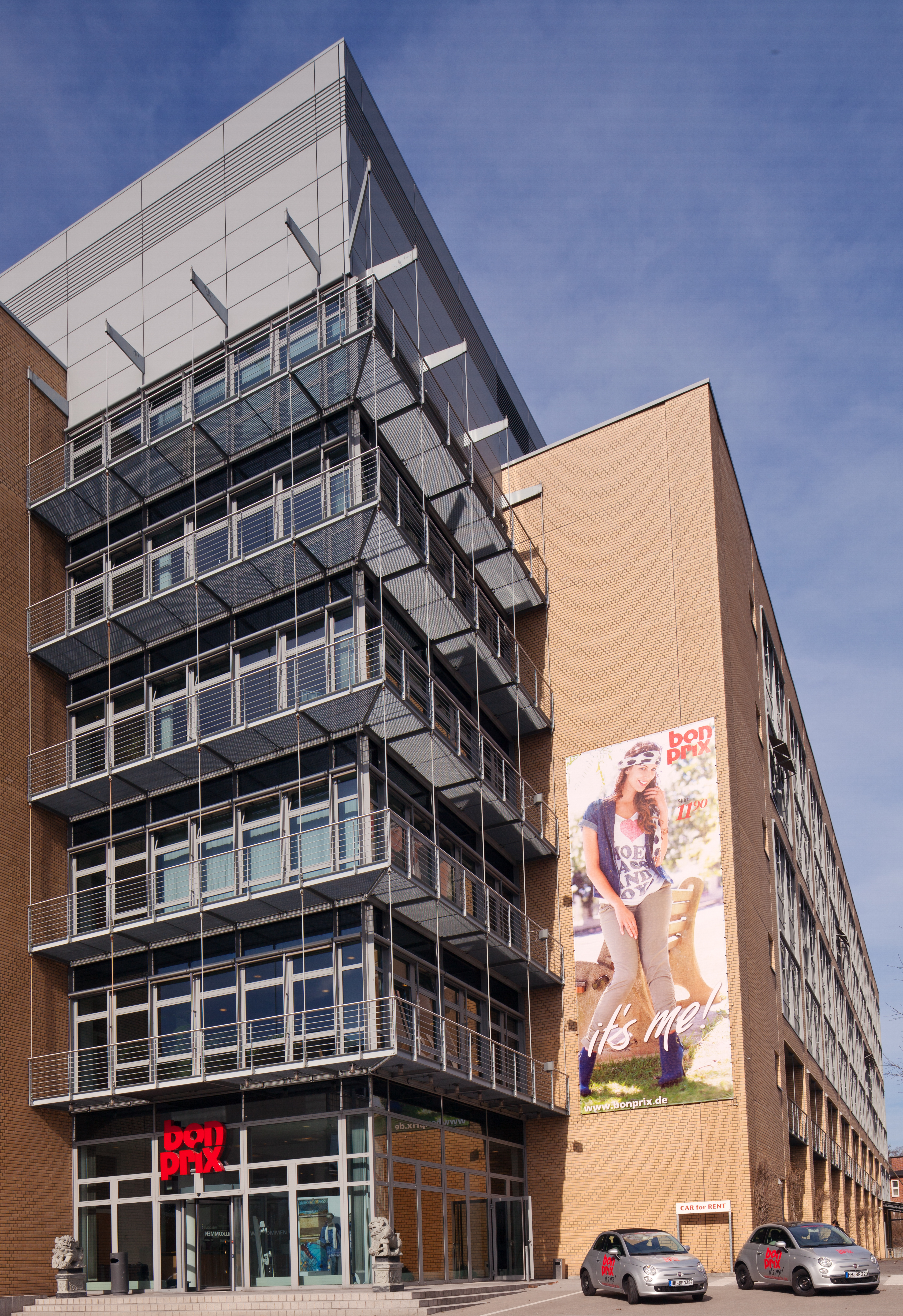 Firmensitz bonprix in Hamburg, Haldesdorfer Straße 61.